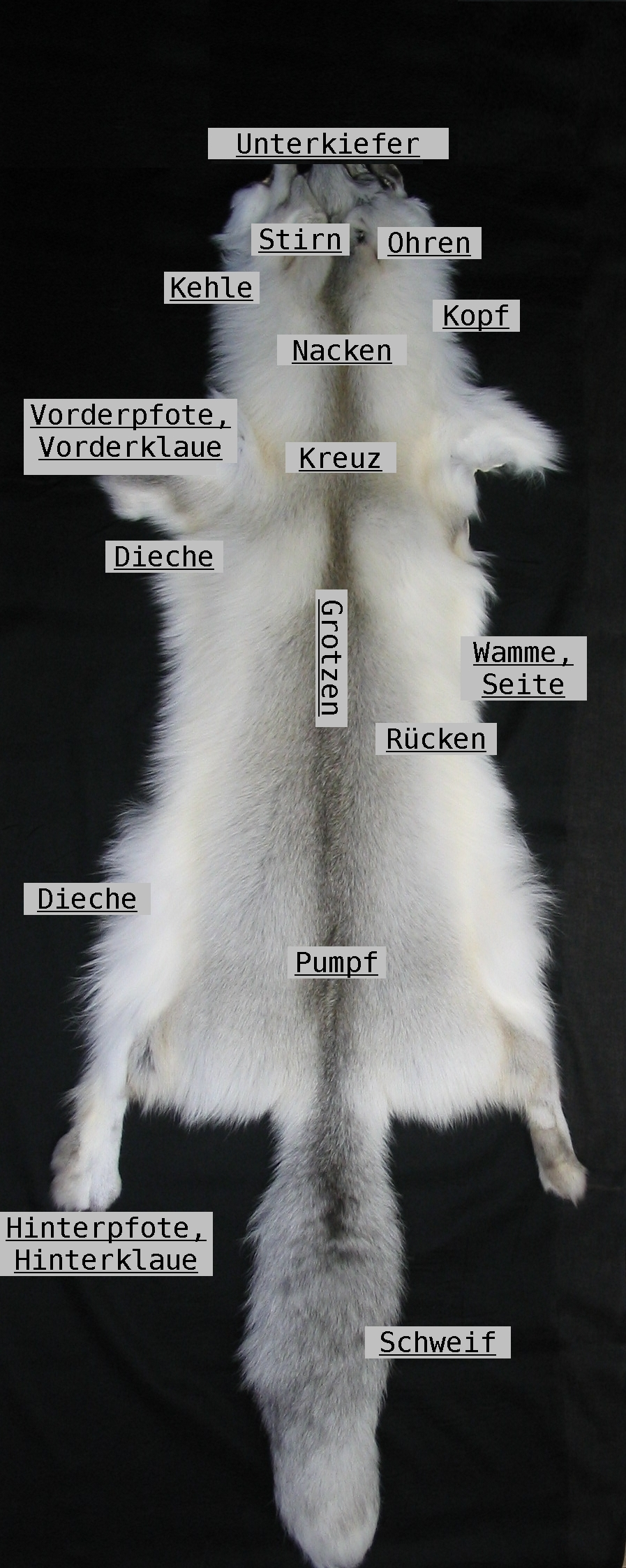 Deutsche Fellbezeichnungen in der Kürschnerei anhand eines Fawn Light (fawnlight) Fuchsfelles.